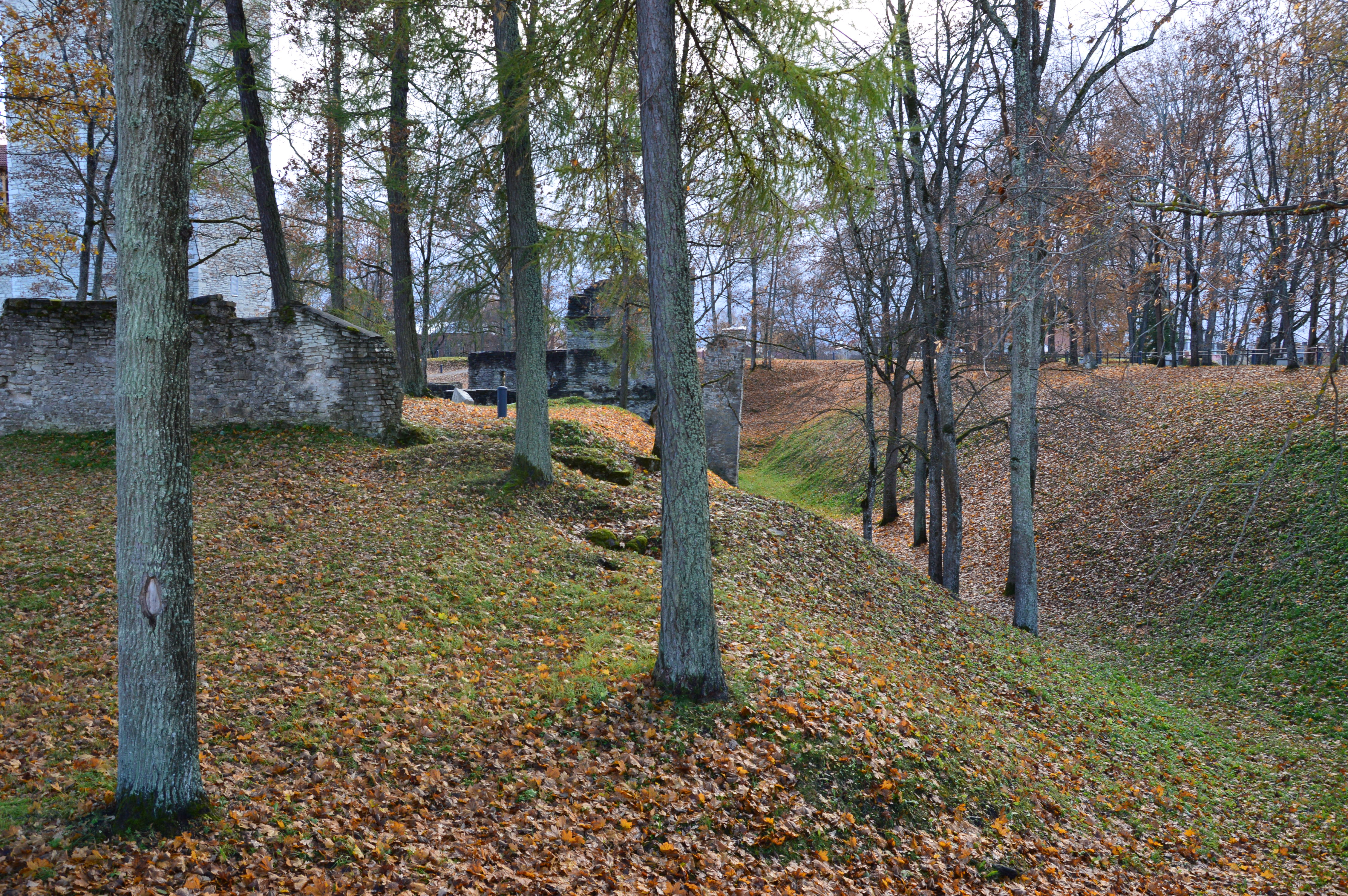 Paide linnuse varemed ja vallikraav. Vallimäe lääneosa vaadatuna loodenurgast.